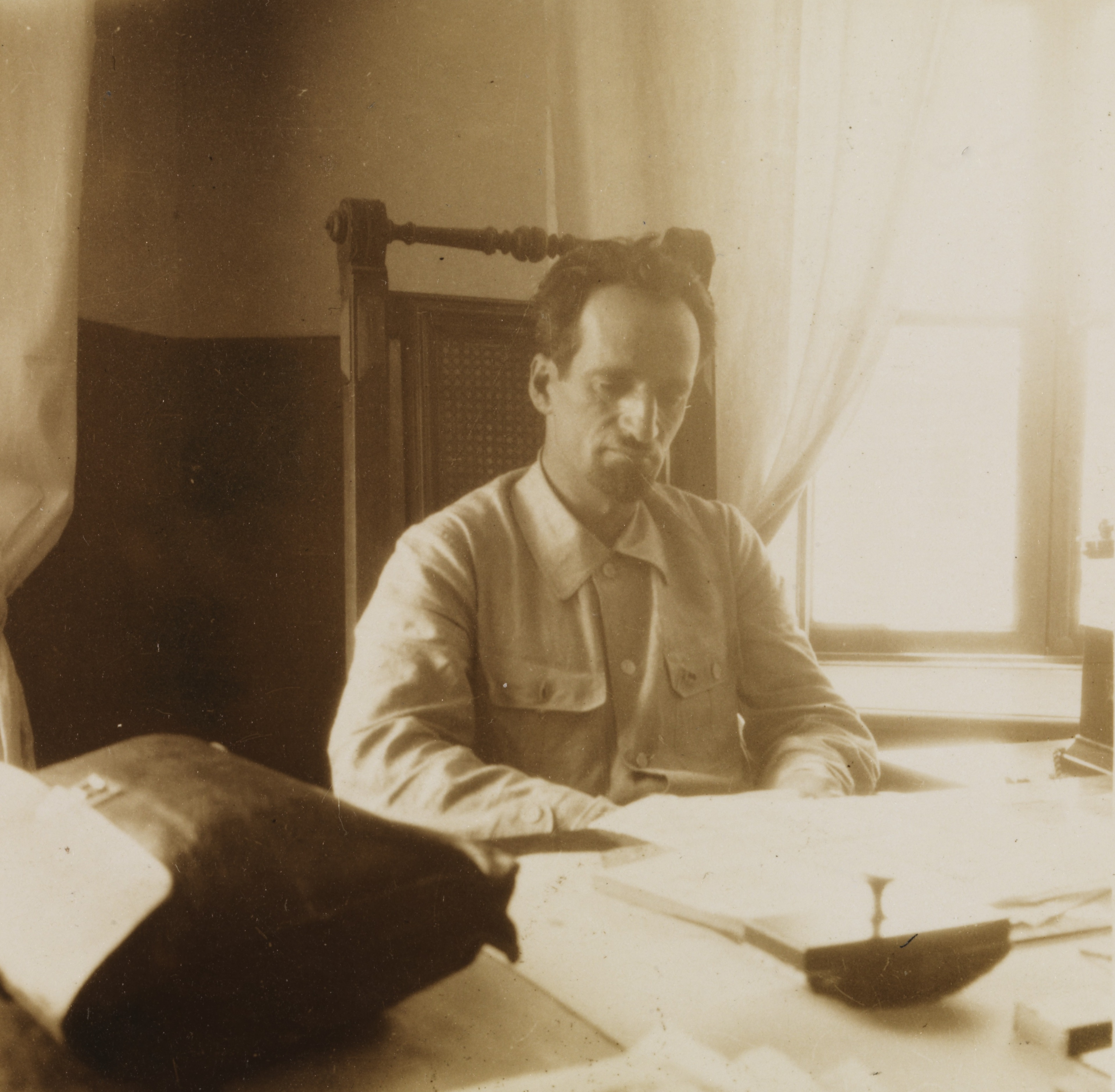 Ersingian, folkekommissær for landbruket i Armenia. Ett av bildene fra reisen gjennom Armenia i perioden 7 juni til 2 juli 1925. På anmodning fra Det Internasjonale Arbeidsbyrå (ILO) og Folkeforbundet reiste Fridtjof Nansen sammen med en utpekt kommisjon sakkyndige for å besøke landet og undersøke planer for kunstig vanning av ørkenområder med tanke på å overføre armenske flyktninger dit. Depicted person: Ersingian Depicted place: Armenia, Jerevan